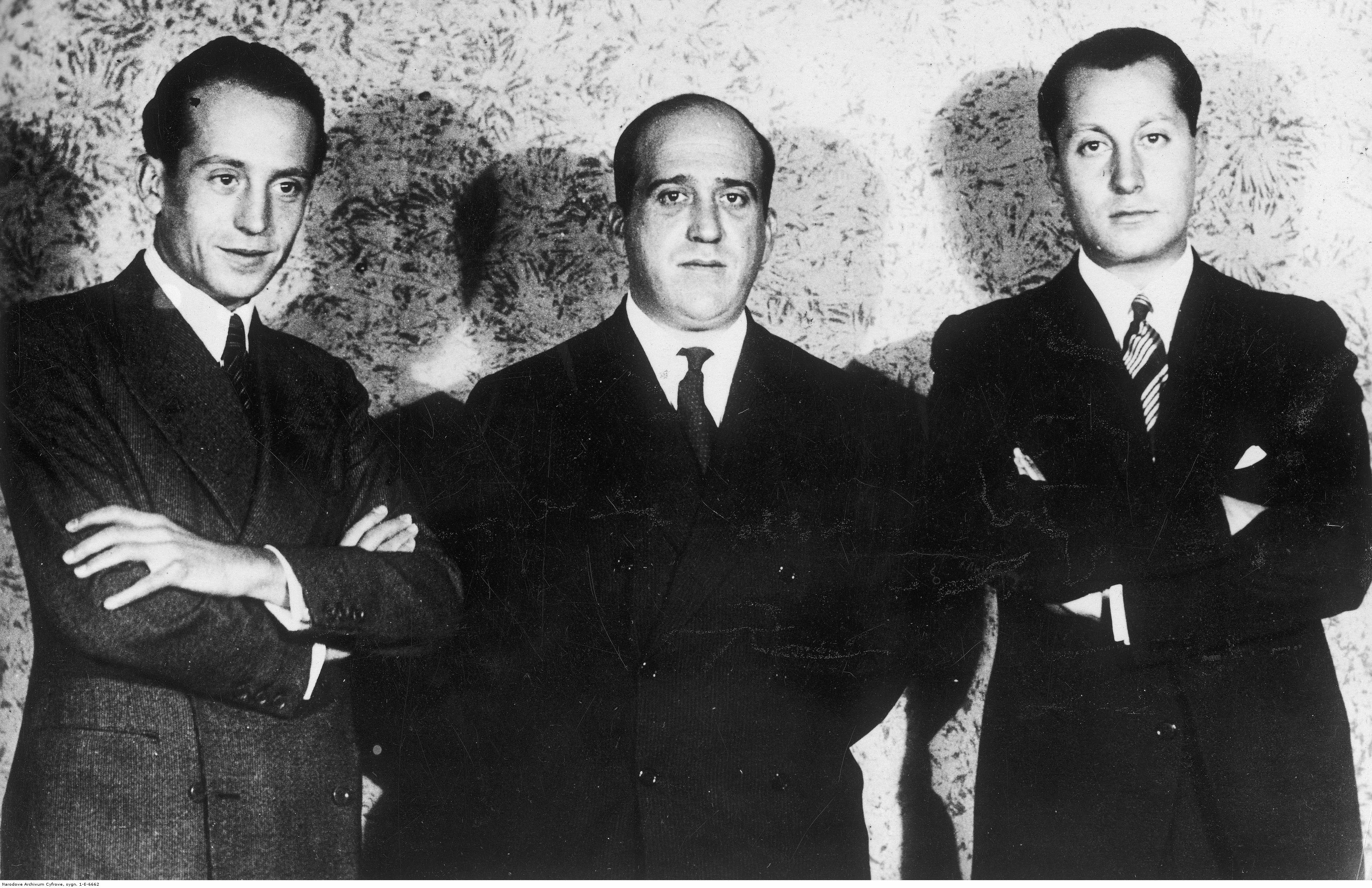 Alfonso García-Valdecasas, Julio Ruiz de Alda y José Antonio Primo de Rivera en la fundación de Falange.